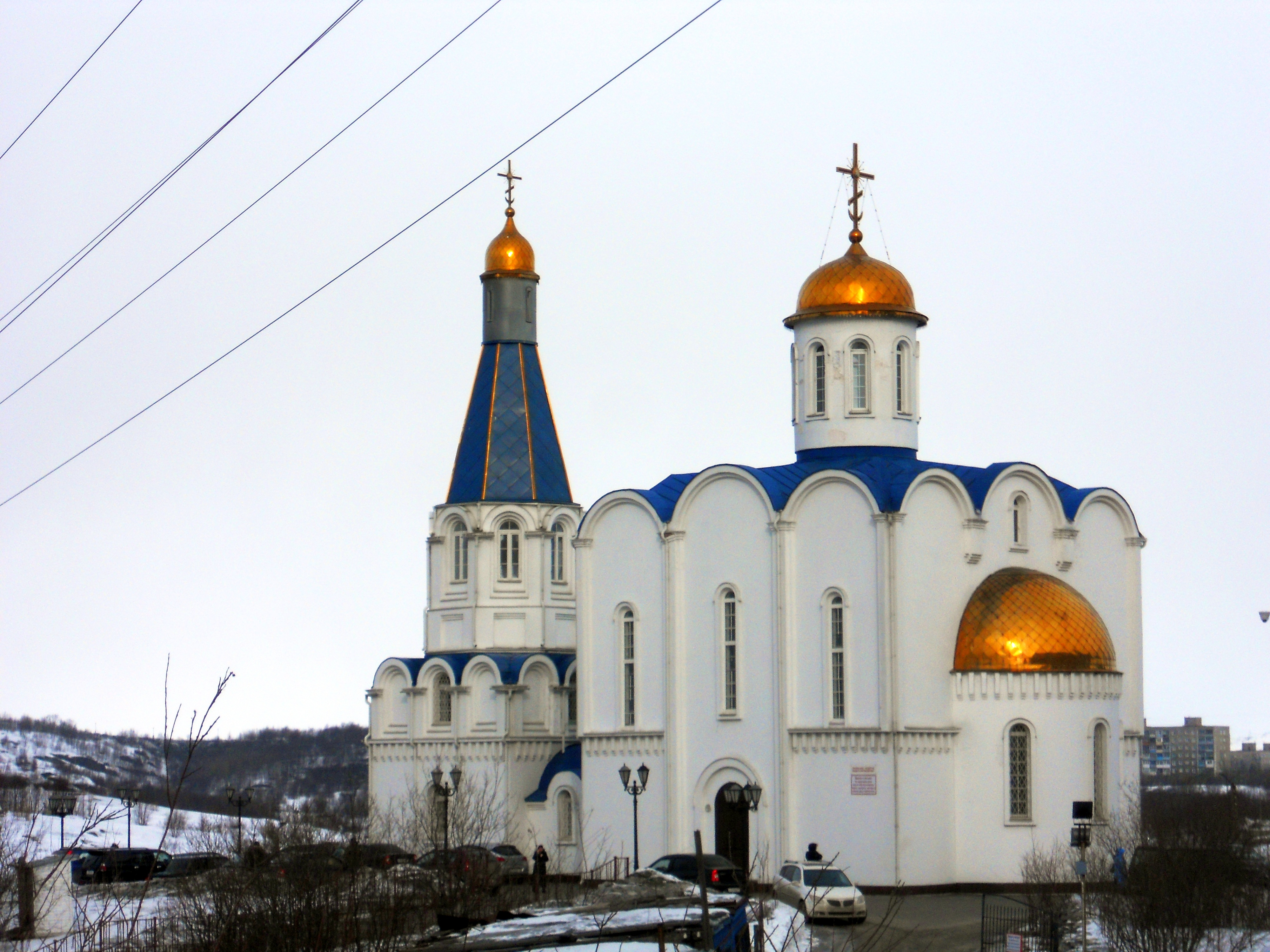 Церковь Спаса-на-Водах (Мурманск)